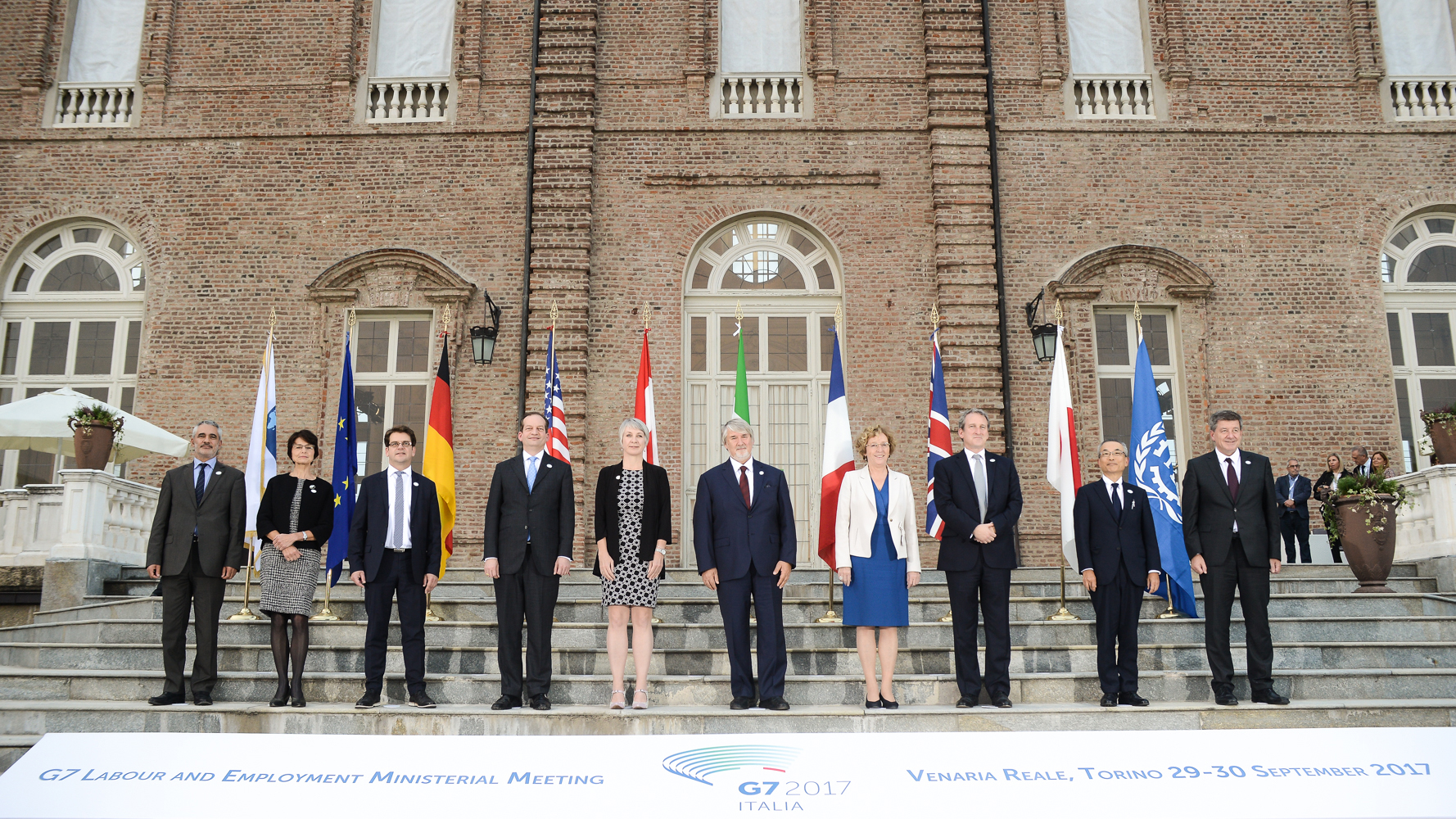 Foto dei partecipanti al G7 Lavoro di Torino del 2017